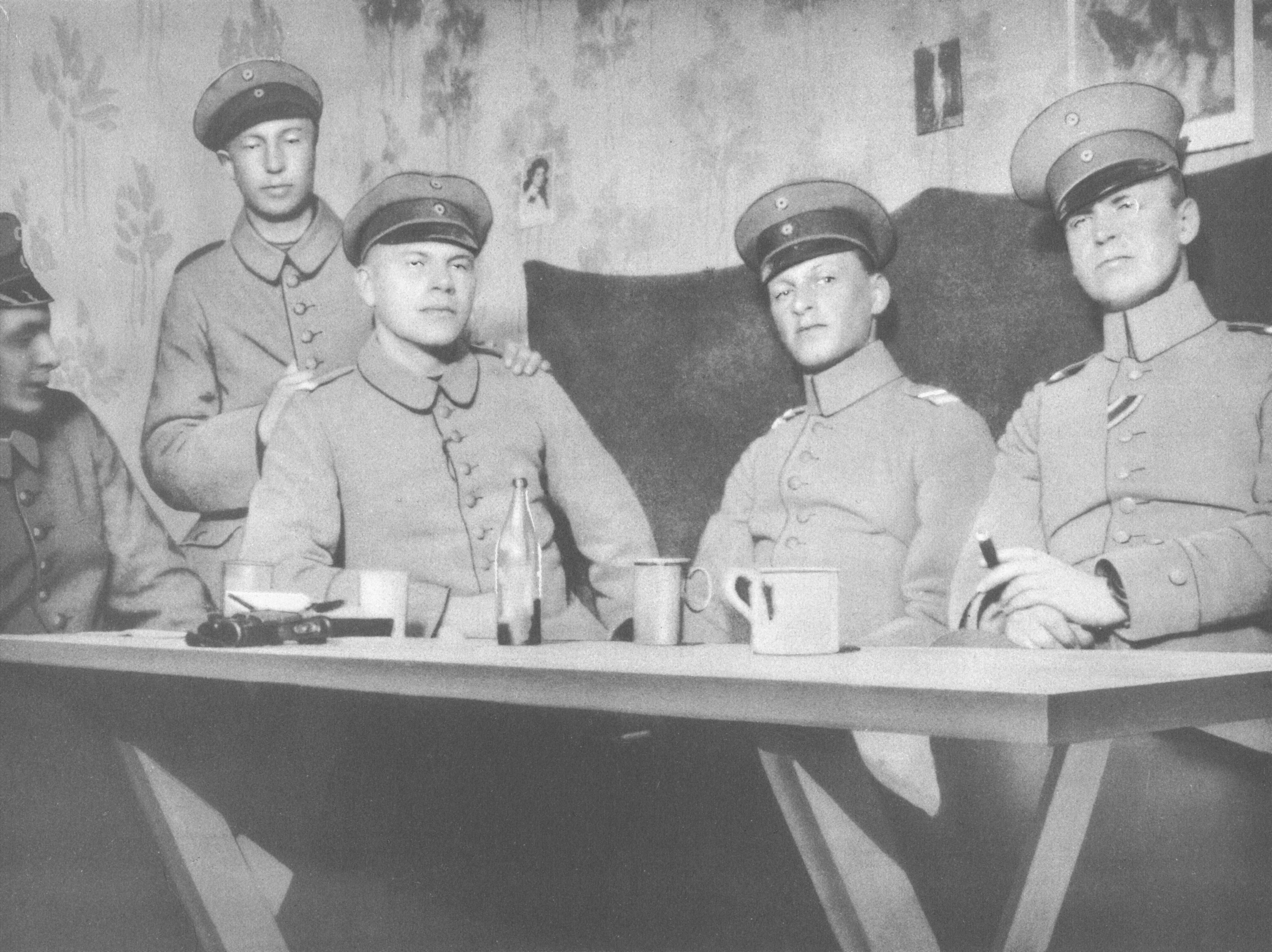 Description